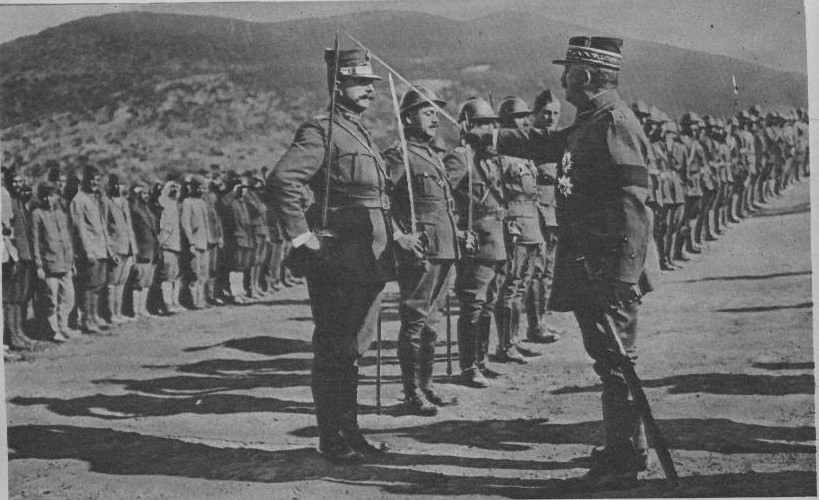 N° 250 15 Franchet d'Espérey passe en revue la 5 armée greque en Macédoine en 1918.